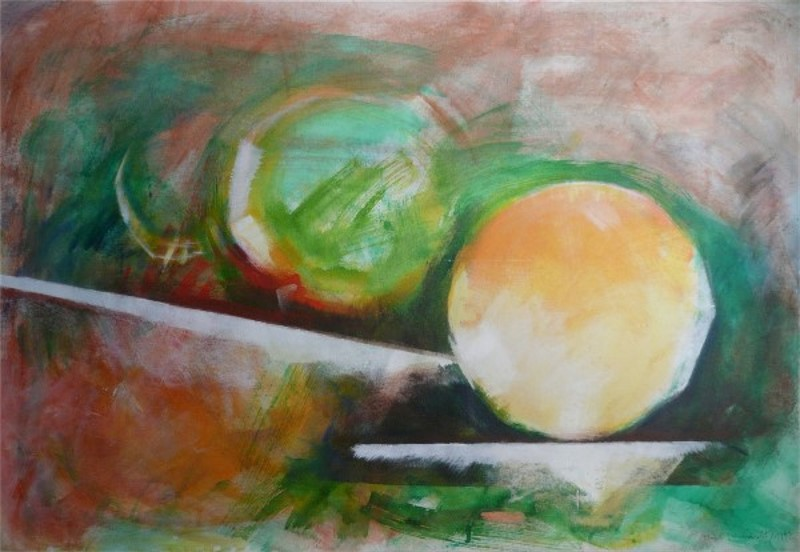 Bydlo, Zyklus BILDER EINER AUSSTELLUNG nach Mussorgsky, Moje Menhardt, Acryl, Leinwand 70x90cm